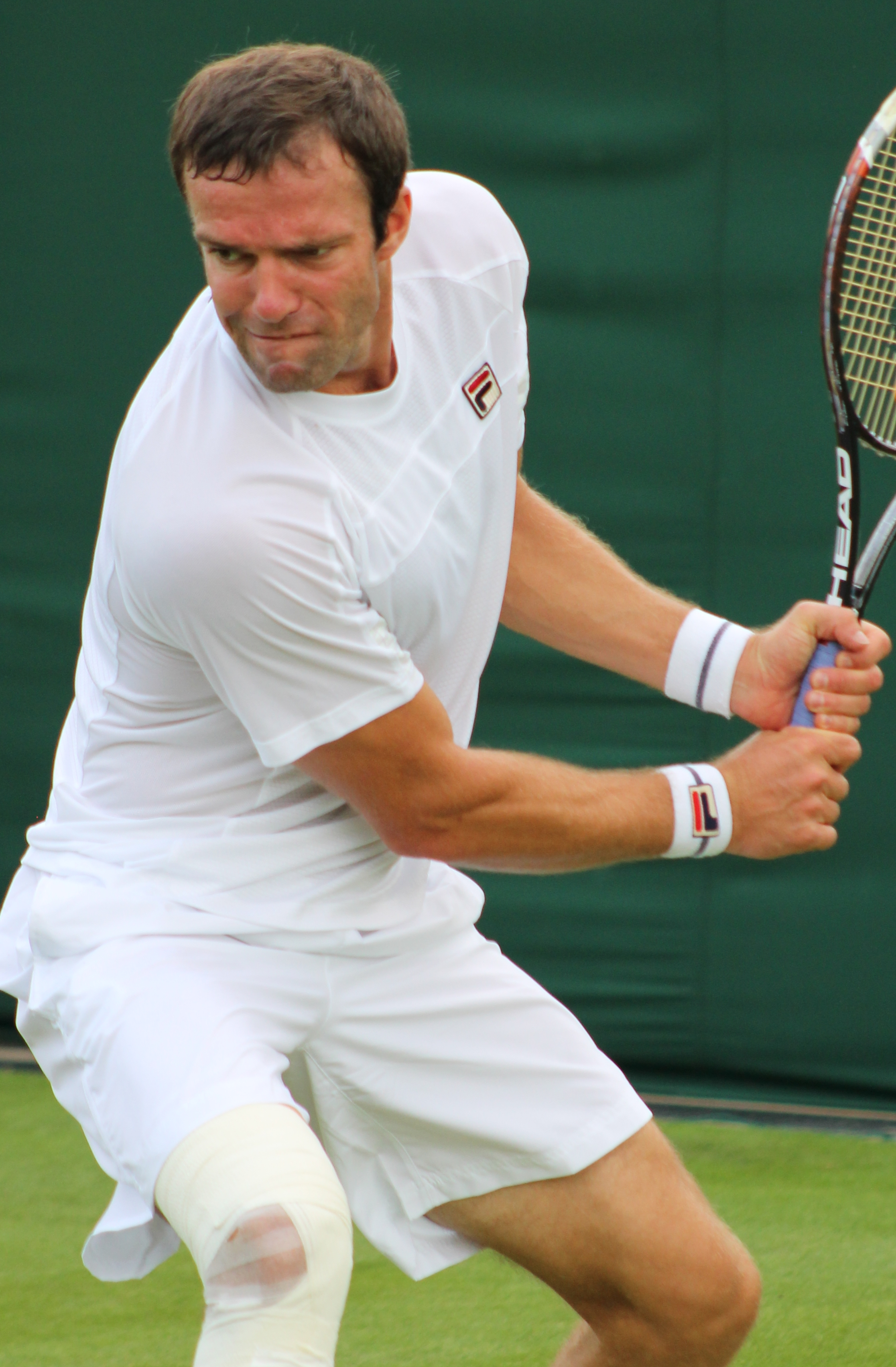 Gabashvili WM14 (4)